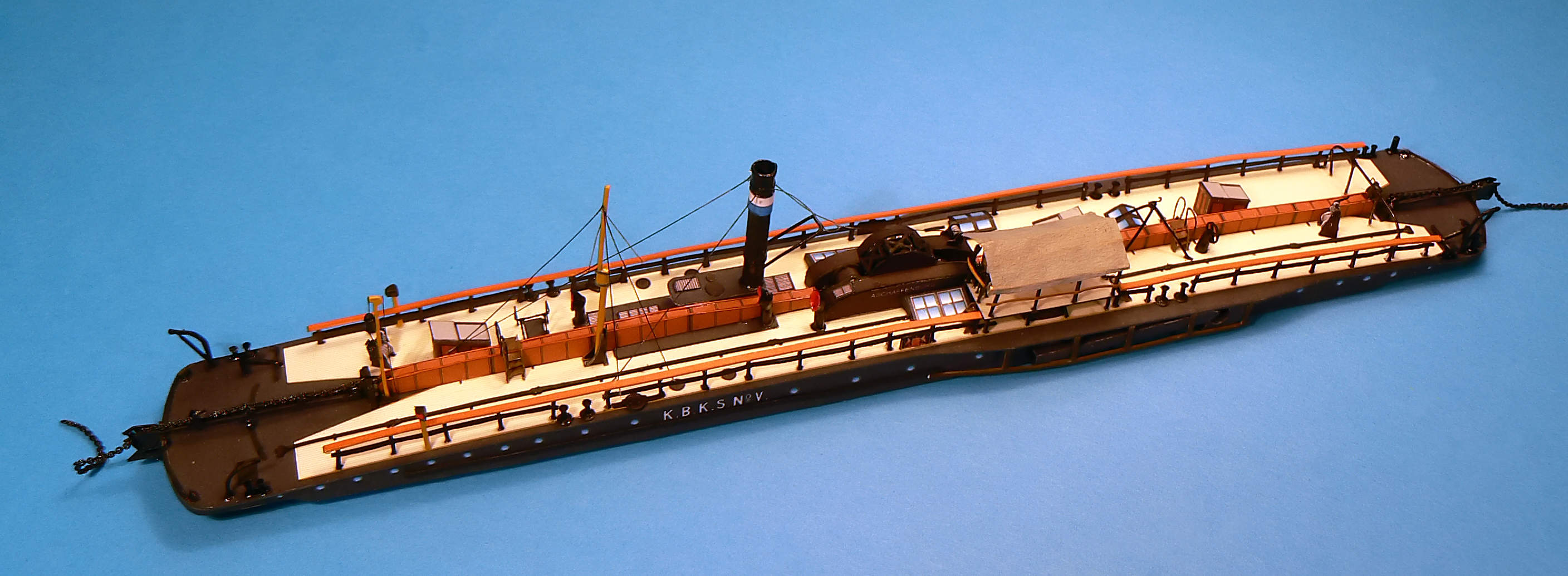 Kartonmodell des K.B.K.S. No. V im Maßstab 1:250